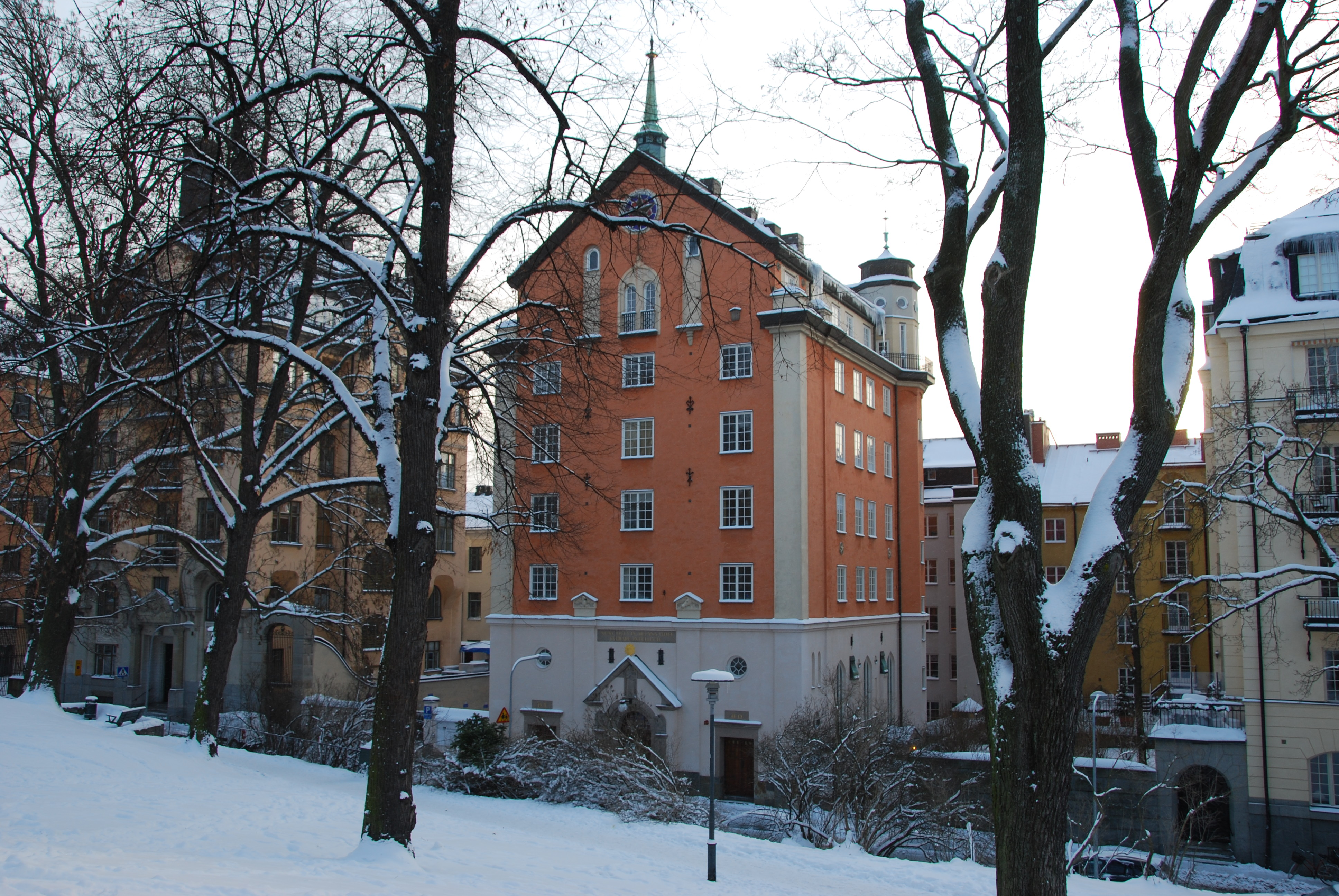 Swedenborgs minneskyrka, Tegnérlunden 7 kv Vingråen 41, byggnadsår 1926-27, arkitekt Erland Heurlin, byggherre Nya Kyrkans Svenska församling, byggmästare A Persson